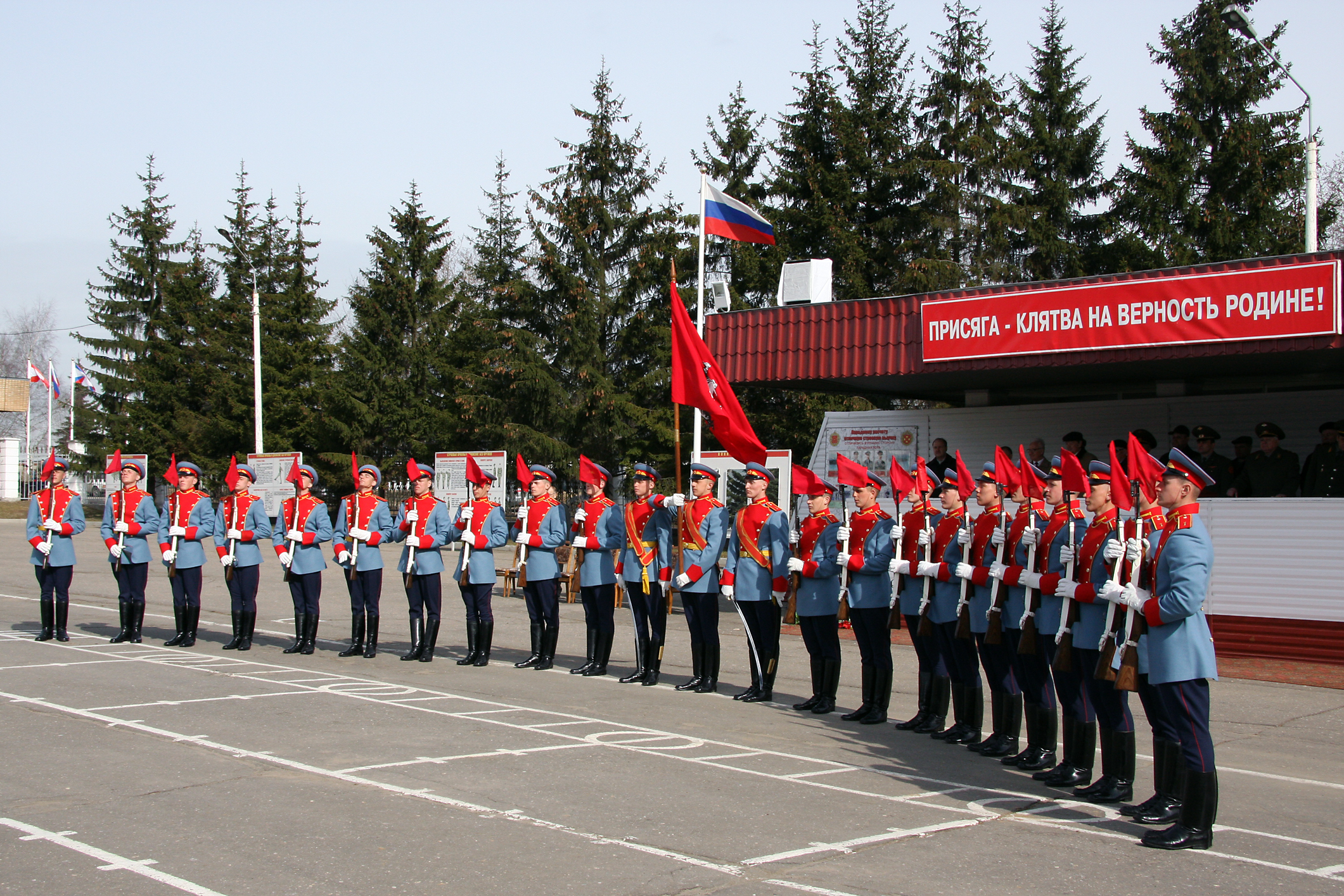 Показательное выступление Отдельной роты Почетного караула 154-го отдельного комендантского ​полка (154-th Independant regiment Detached honour Gurads company show)